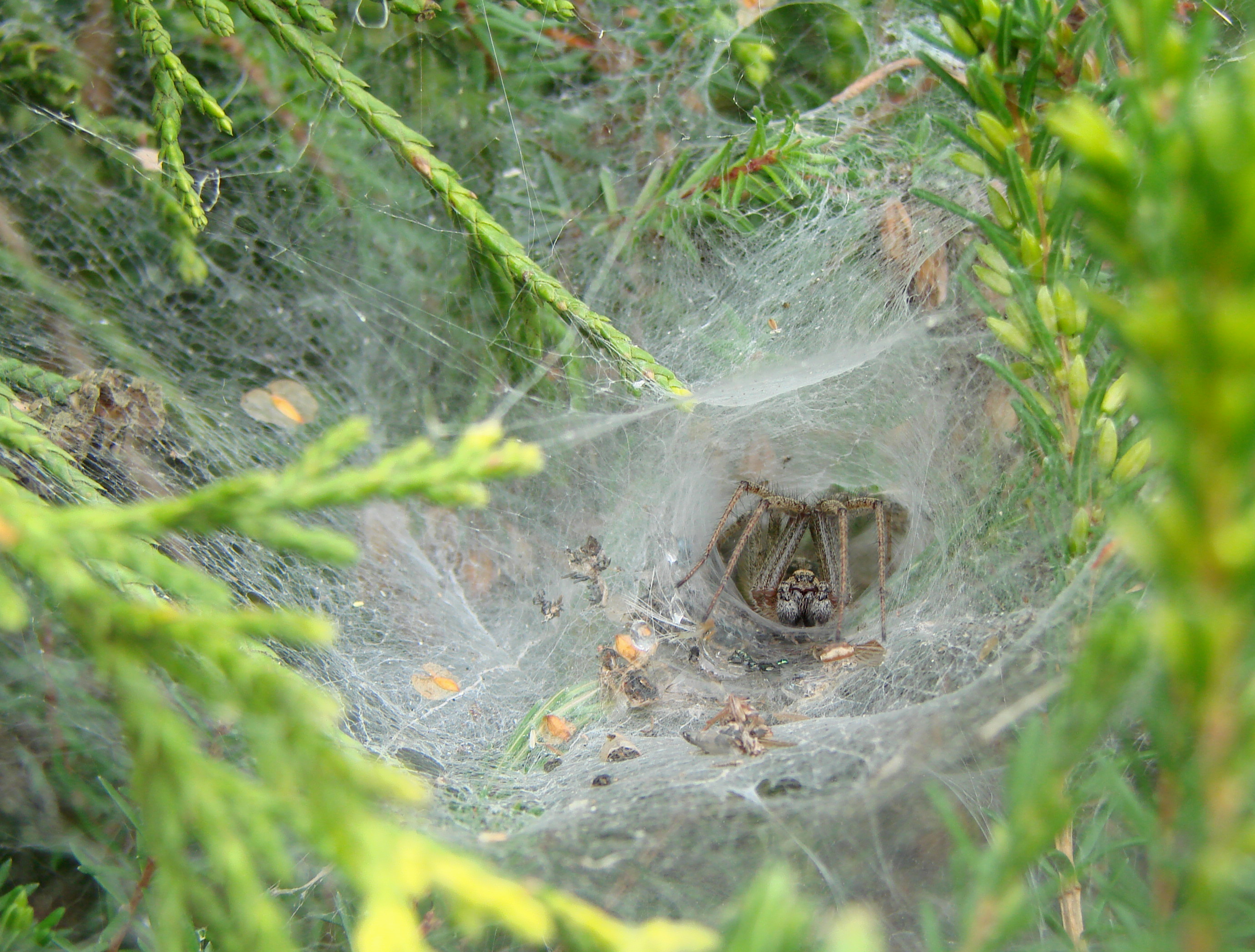 Araignée (agelenidae) dans la partie de sa toile formant un tunnel.Sud-Ouest de la France.